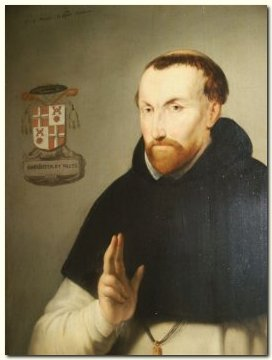 Godfried van Mierlo, bishop of Haarlem.